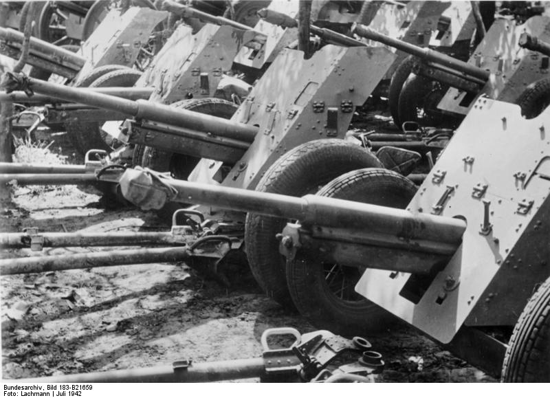 Bei dem erfolgreichen Vordringen unserer Truppen im südlichen Frontabschnitt der Ostfront wurden riesige Mengen feindlichen Kriegsmaterials erbeutet. - Dicht an dicht stehen die feindlichen Geschütze wohlgeordnet nach ihren Kalibern auf den Sammelplätzen aufgereiht und warten auf ihren Abtransport. PK-Aufnahme Kriegsberichter Lachmann 24.7.1942